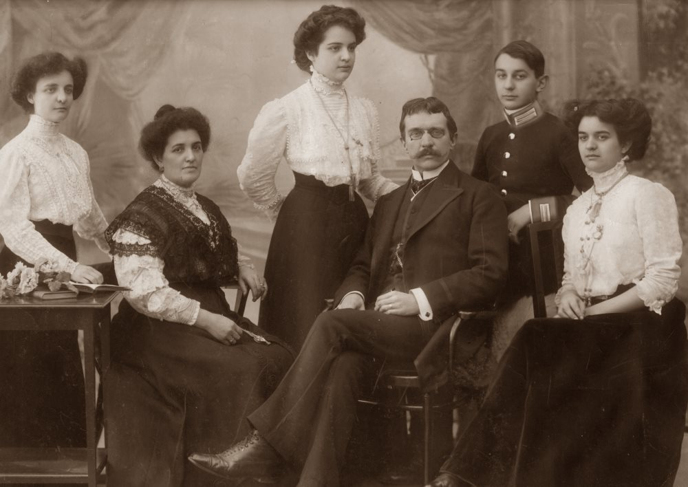 Familien Hermann von Schullern zu Schrattenhofen (1910) - vlnr: Elfriede, Teresina, Irene, Hermann, Manfred, Eleonore